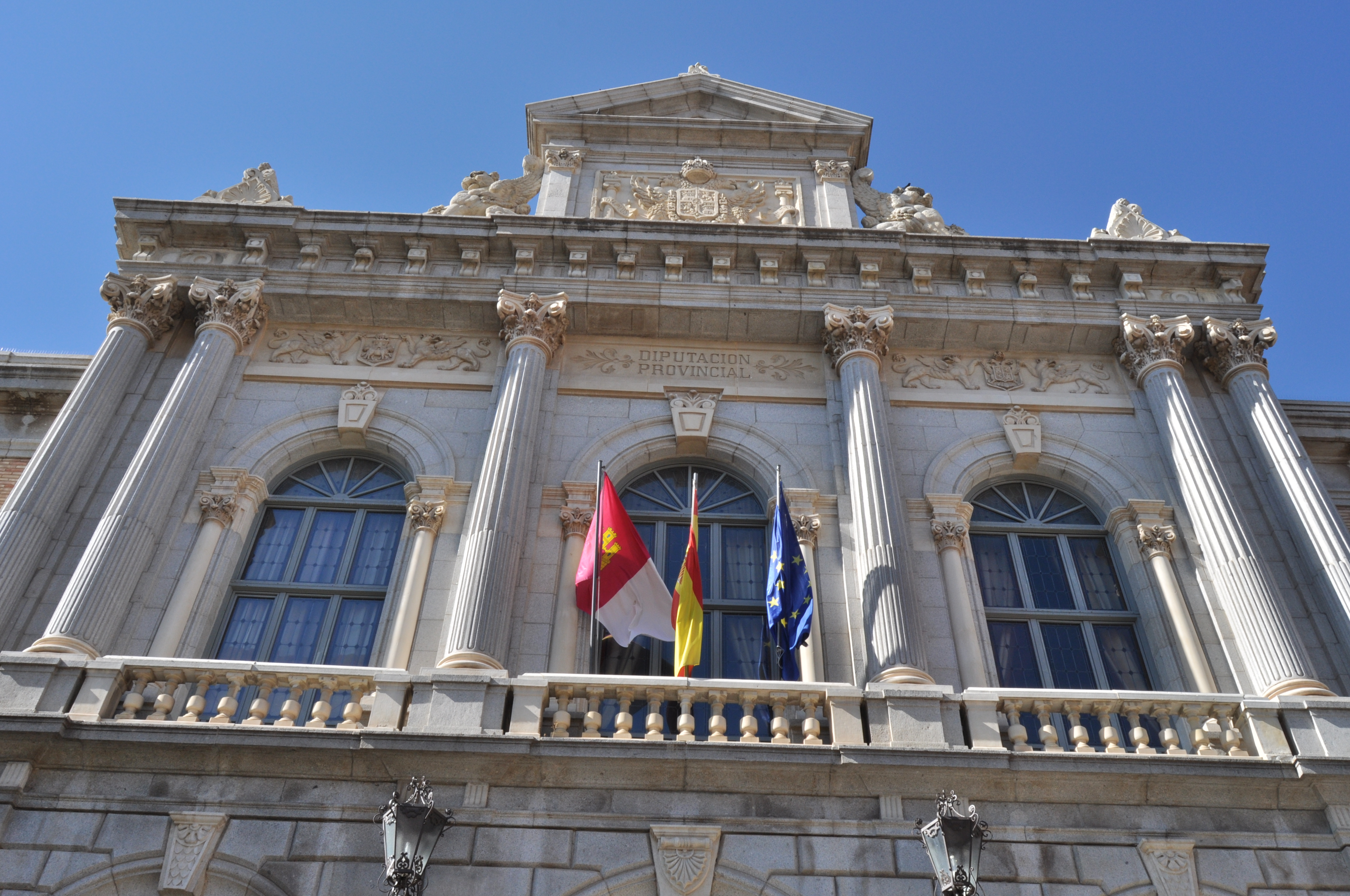 Toledo Capital - 174